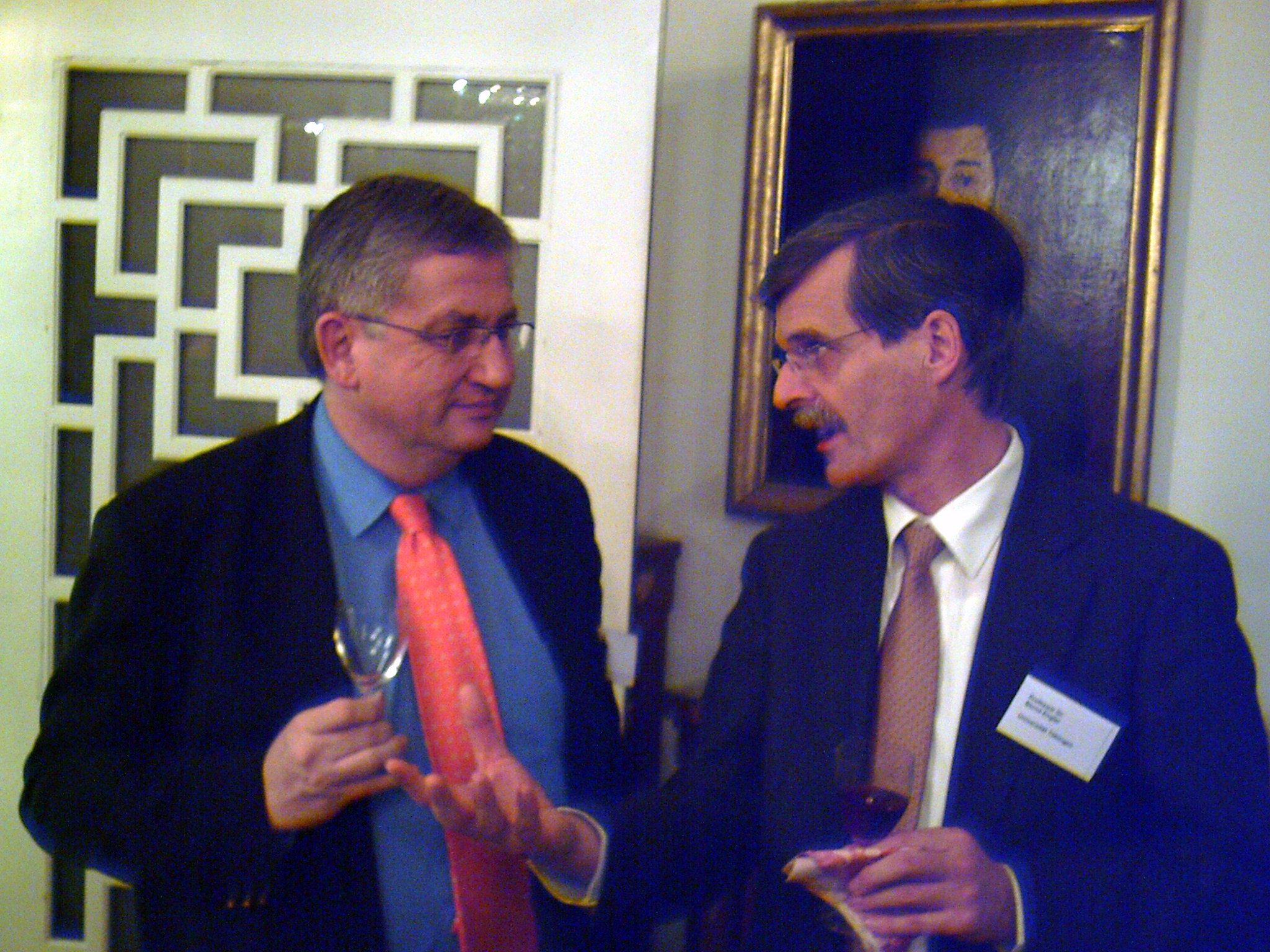 Julian Würtenberger, Ministerialdirektor im Ministerium für Wissenschaft, Forschung und Kunst des Landes Baden-Württemberg (links) mit Bernd Engler, Professor für Amerikanistik und Rektor der Universität Tübingen, bei der Feierstunde im Kleinen Senat anlässlich der Verleihung des Shared University Research Grant der IBM für das Wilhelm-Schickard-Institut.